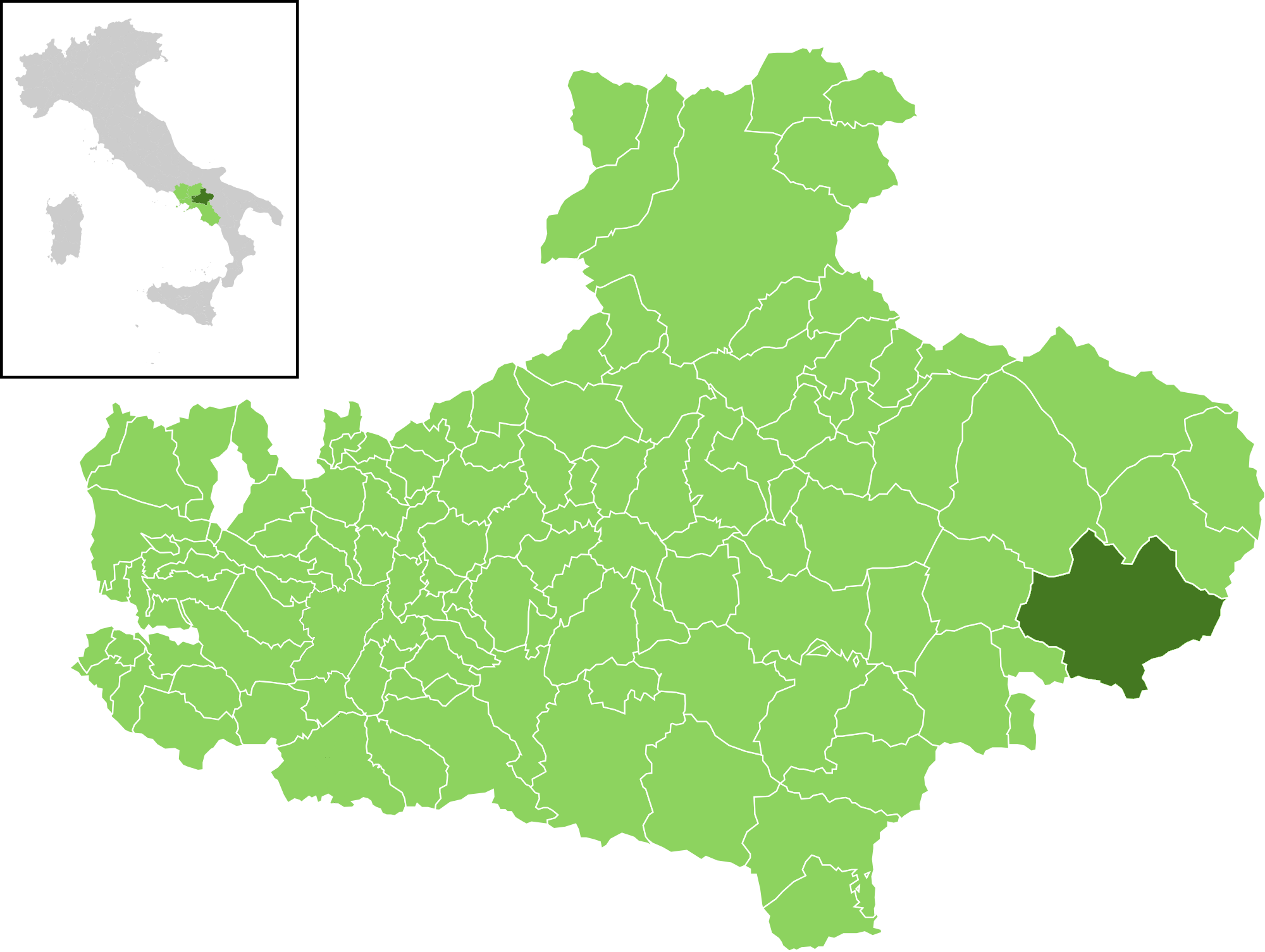 Il comune all'interno della provincia di Avellino